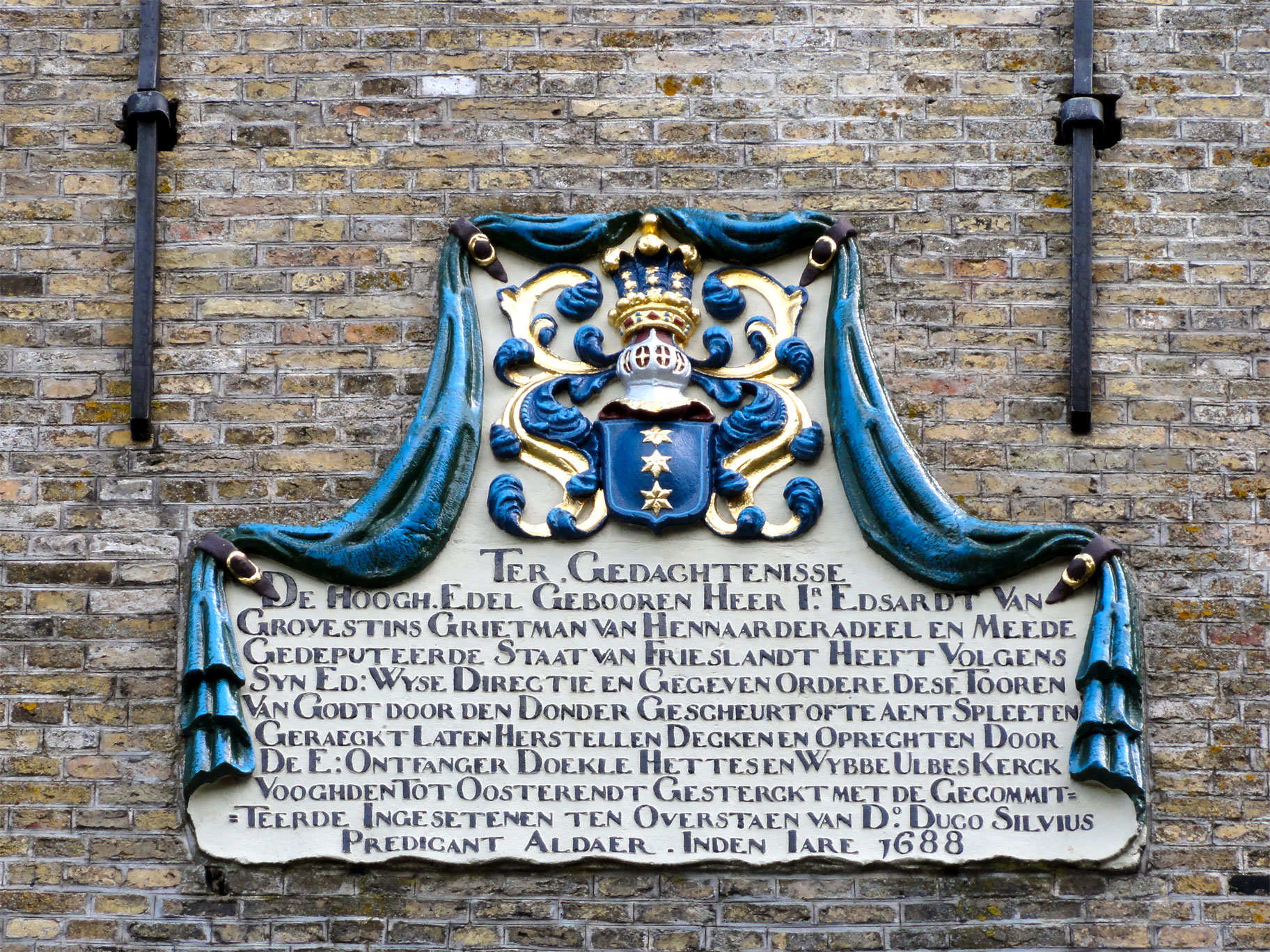 Martinikerk in Easterein (gedenksteen in de toren)